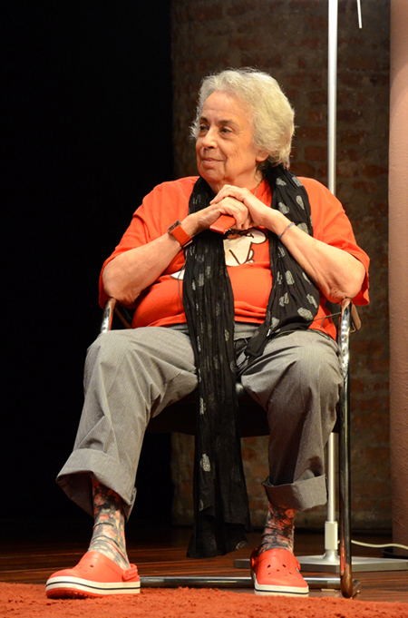 Colita a la taula rodona de la seva exposició a La Pedrera (Barcelona)